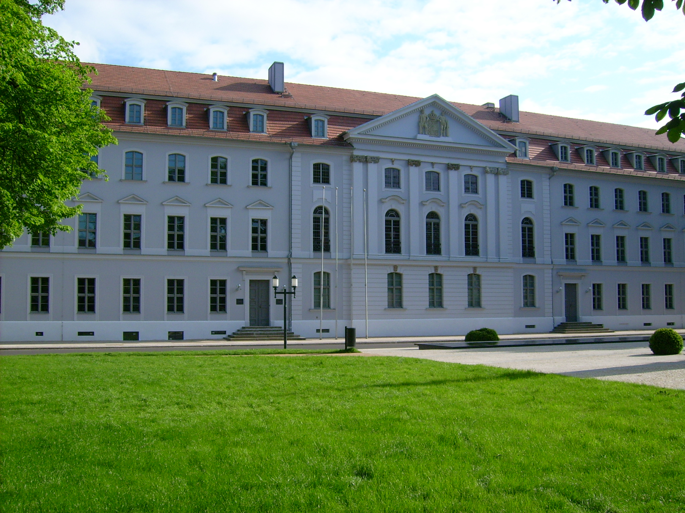 Hauptgebäude der Ernst-Moritz-Arndt-Universität_Greifswald (Vorderseite, Domstraße 11), Greifswald, Germany